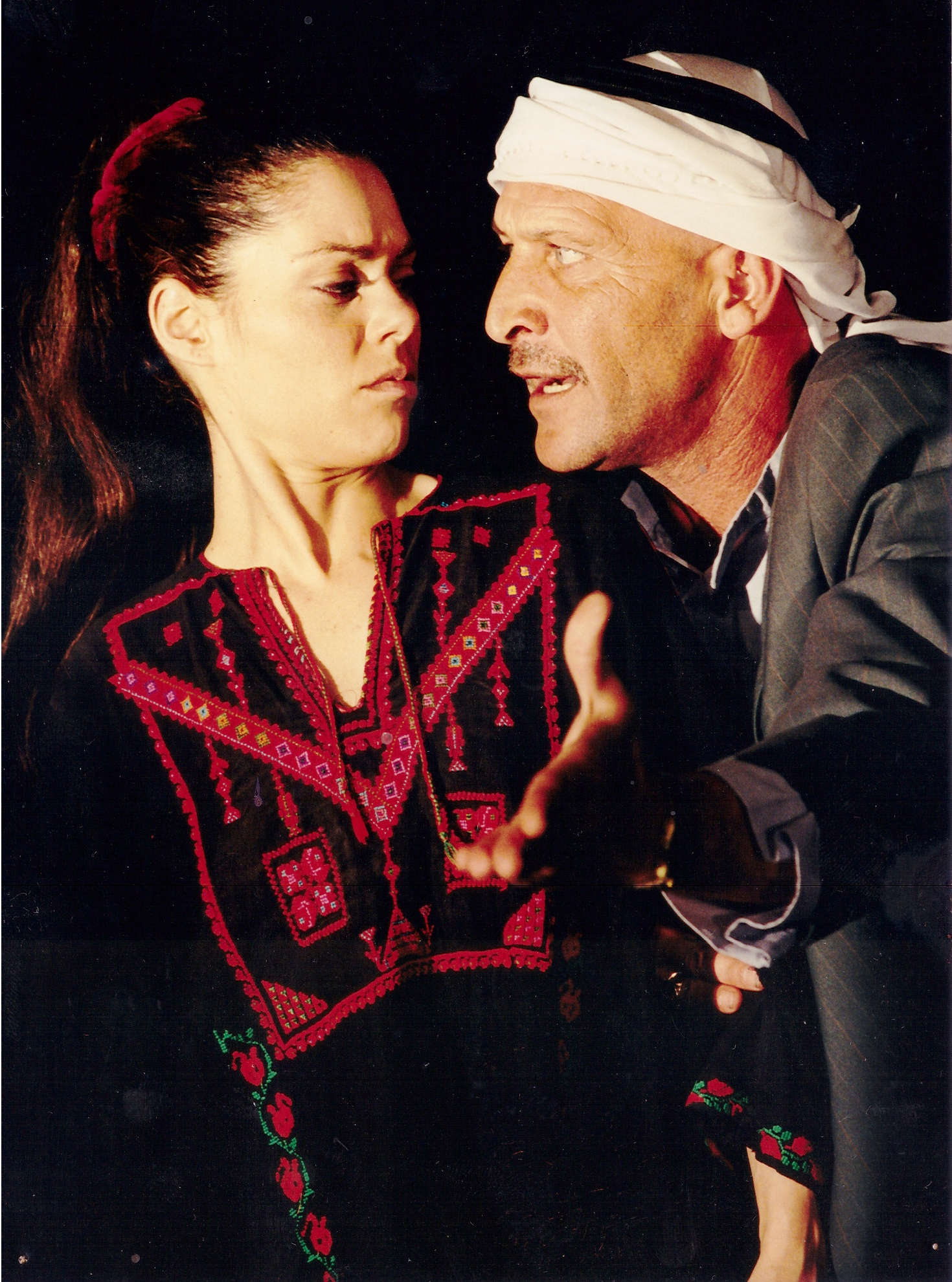 מיקי פלג רוטשטיין לצידו של עמוס לביא בהצגה ירח שחור